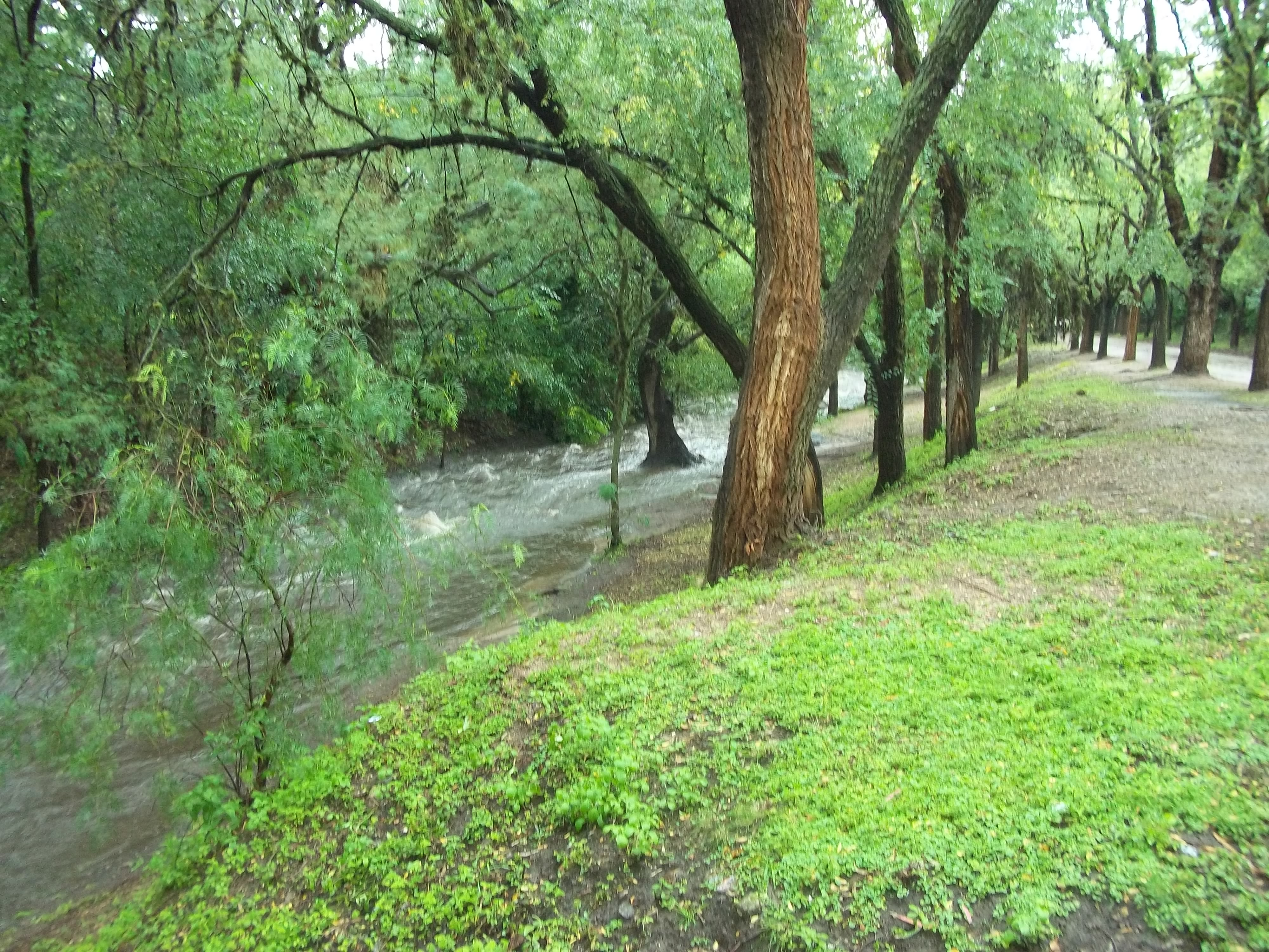 luego de la creciente en el verano del 2014